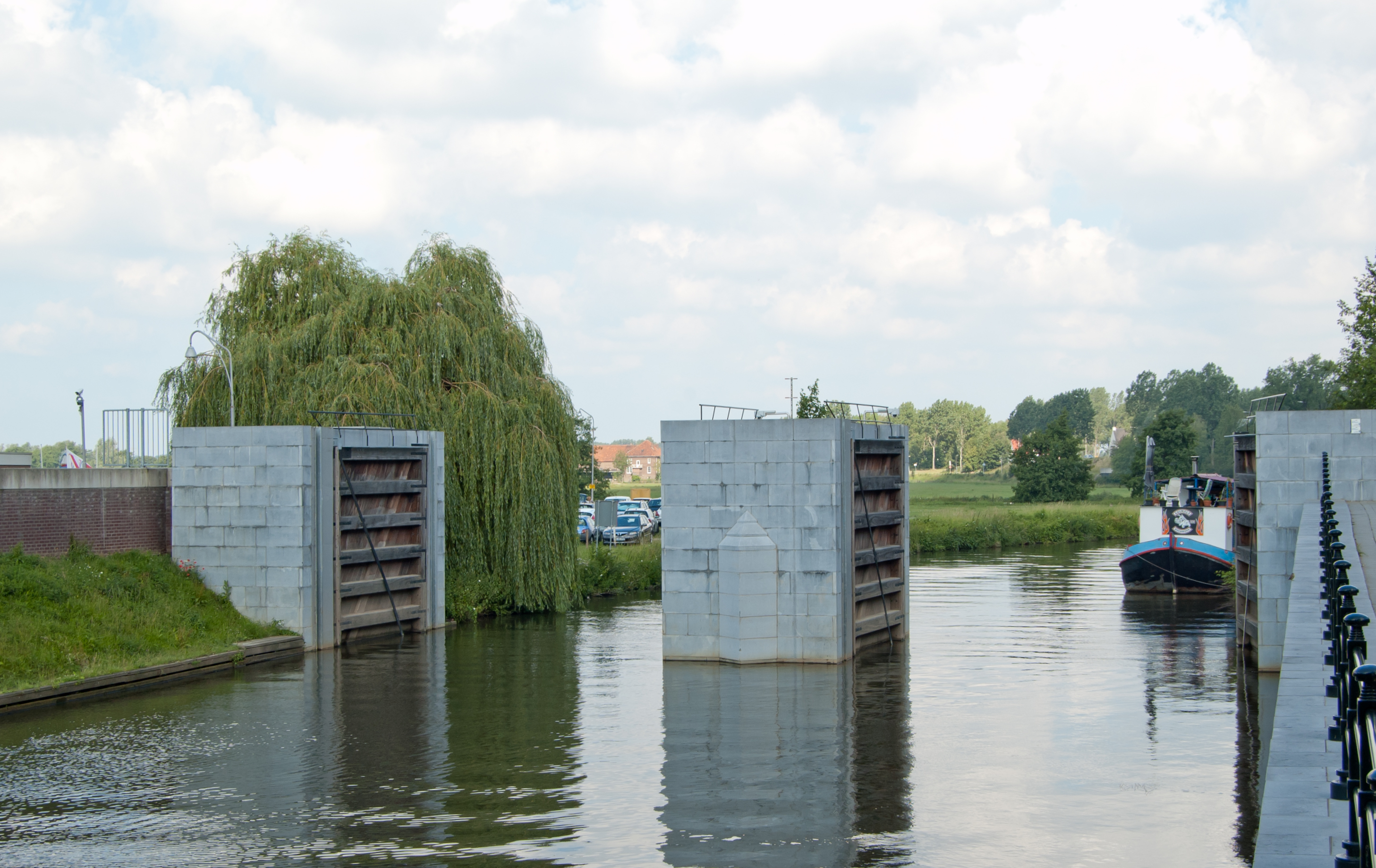 Die Hochwasserschutztore in der Rur an der Looskade in Roermond in geöffnetem Zustand, Blickrichtung rurabwärts in Richtung Maas